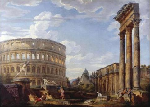 com o Coliseu e o Arco de Constantino